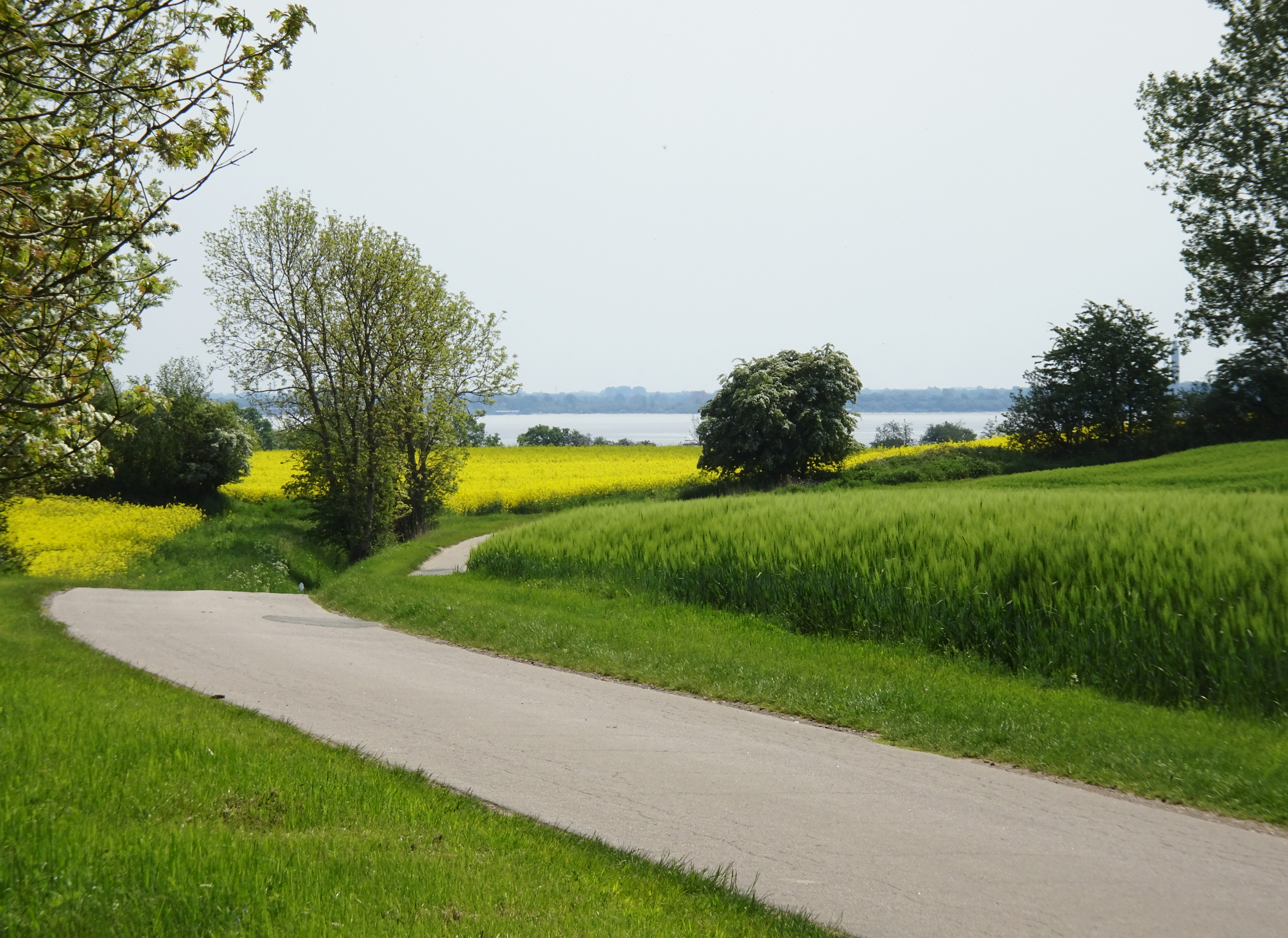 Schwedeneck Landschaft mit Ostsee im Hintergrund